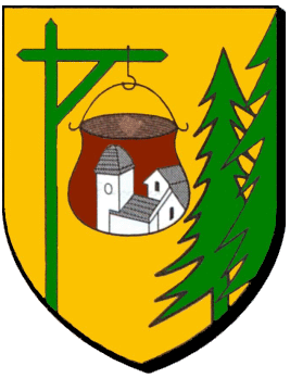 Blason de la Commune de Mignovillard